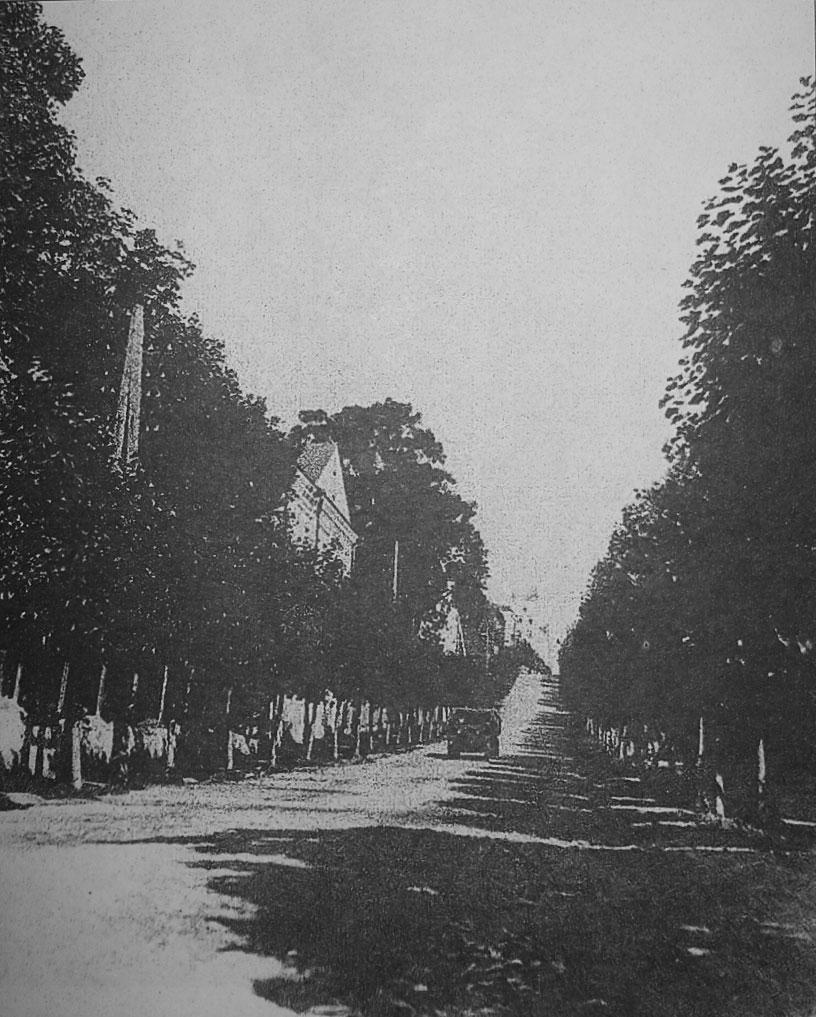 Беларуская (тарашкевіца): Менск, Ляхаўка, вуліца Францішканская (vulica Franciškanskaja). Пад'ём да Новага Места